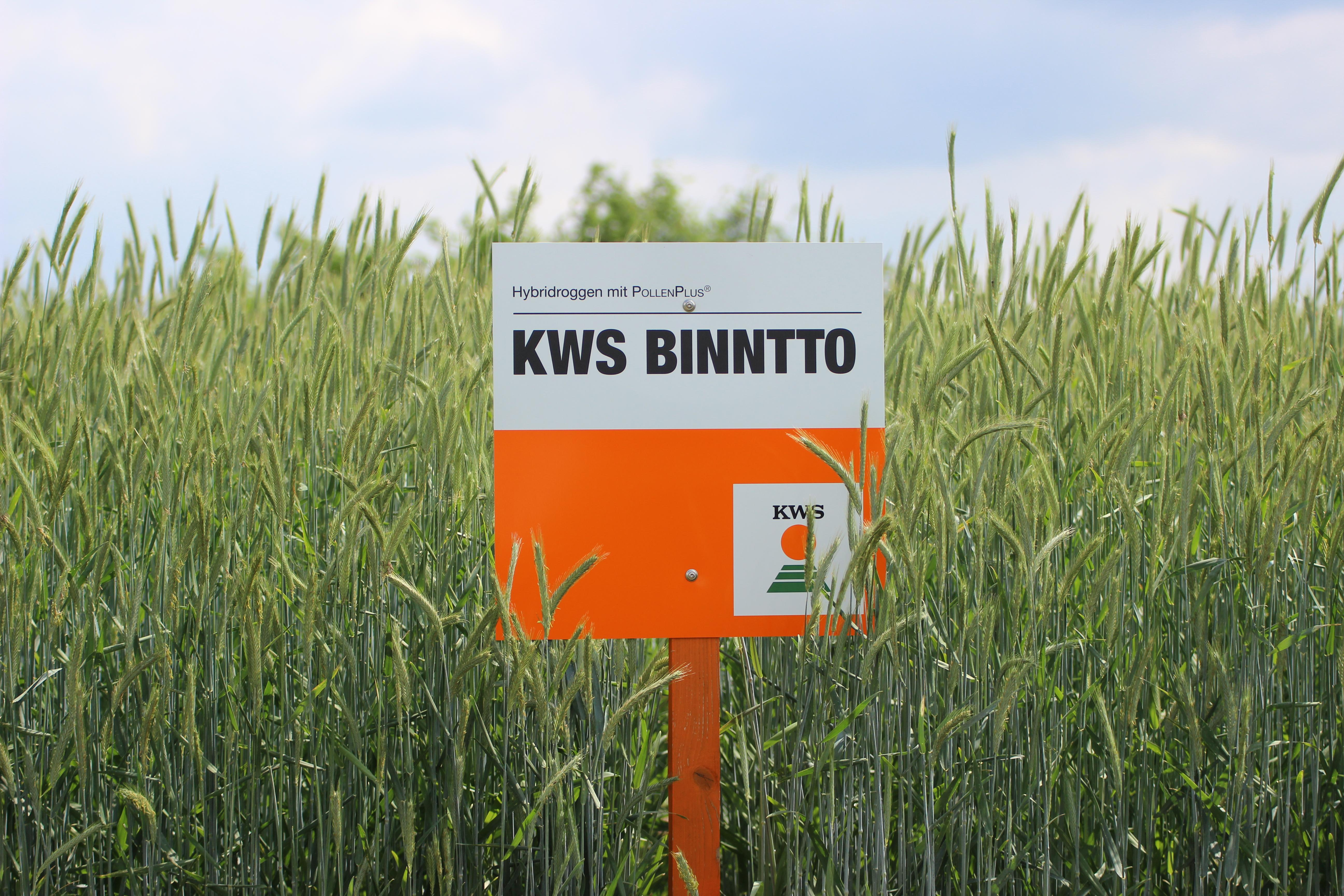 KWS Binntto, Hybridroggensorte